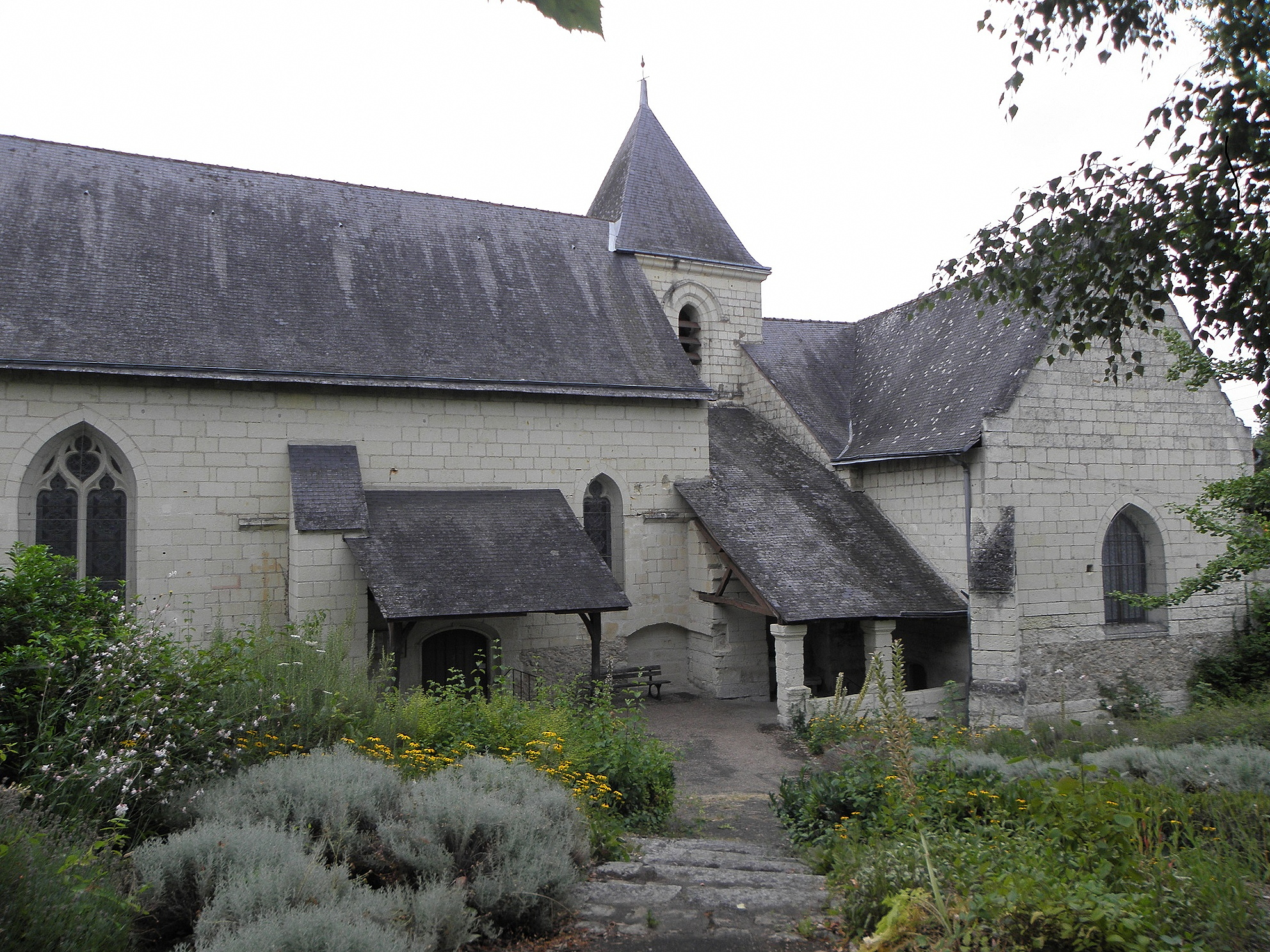 Église Saint-Pierre de Dampierre-sur-Loire, commune de Saumur (49). Flanc sud.